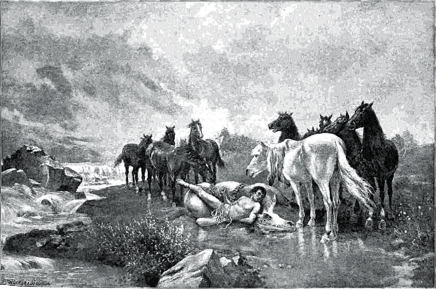 Grabado copia del cuadro Mazeppa (1892) de Isidro Gil Gabilondo